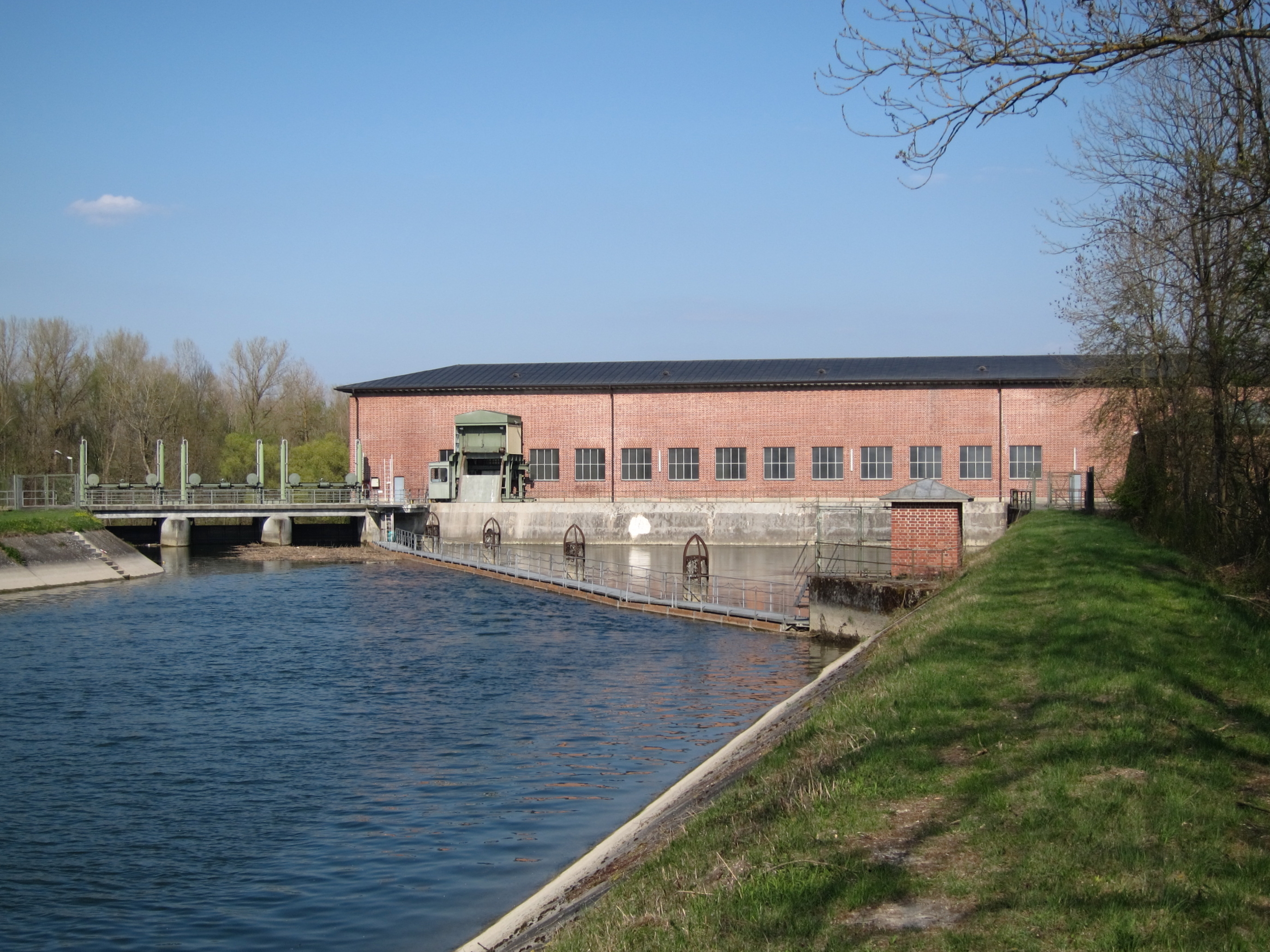 Werk Uppenborn 2 der Stadtwerke München im Mittlere-Isar-Kanal